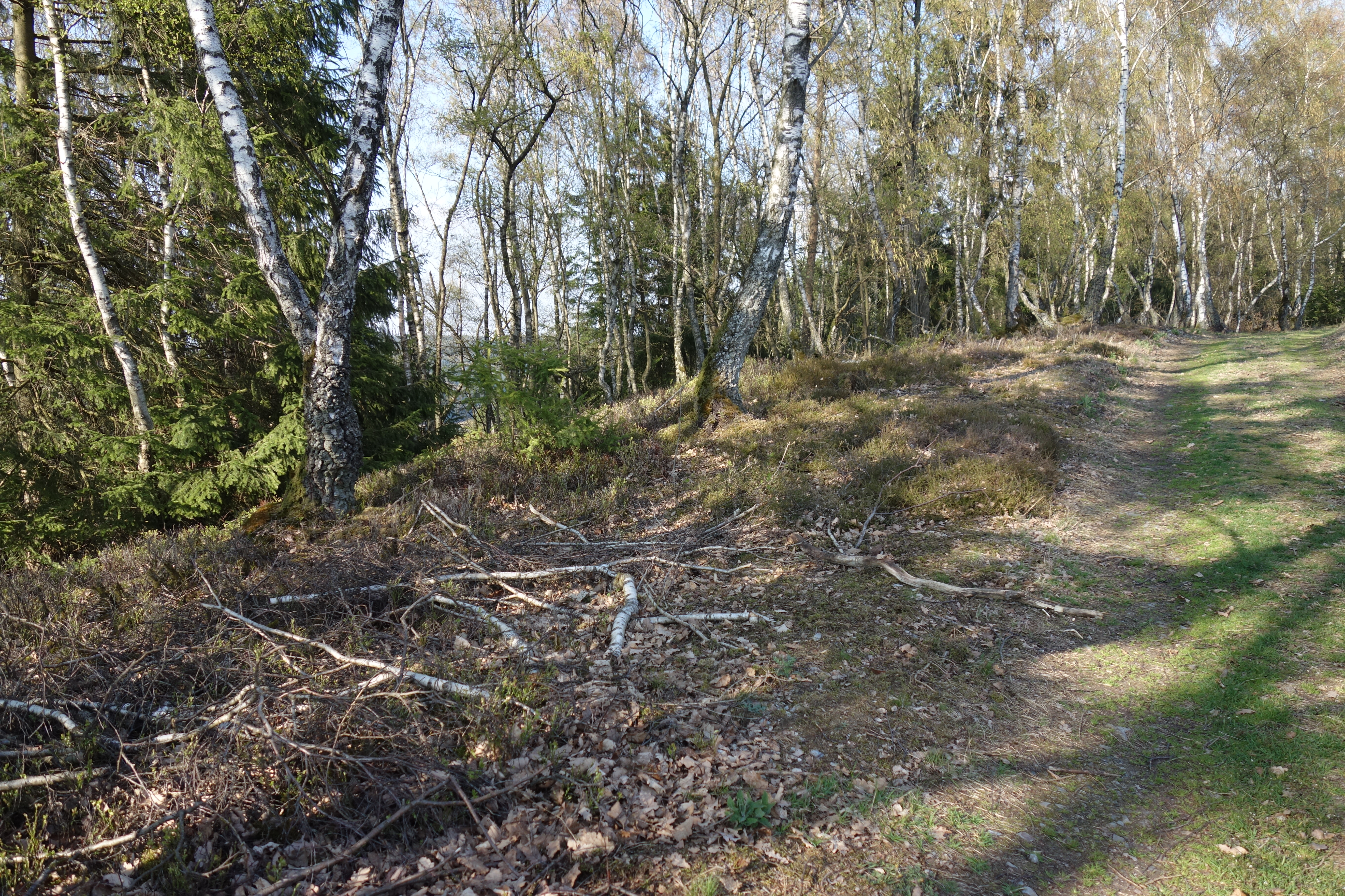 Bild vom westlichen Bereich des Naturschutzgebiet Odin / Hardt; aufgenommen vom Weg an der südlichen Grenze.